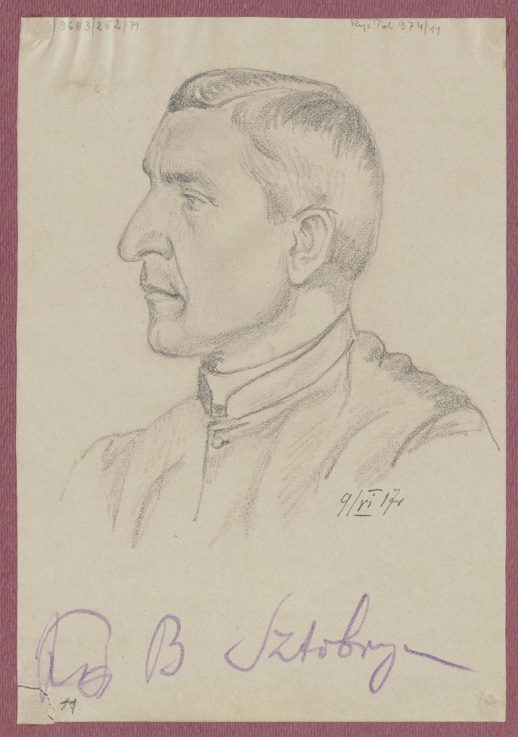 Portret Bolesława Sztobryna (1871–1926) w albumie portretów członków Tymczasowej Rady Stanu. Rysunek pochodzi z Muzeum Narodowego w Warszawie. Opublikowany w Federacji Bibliotek Cyfrowych. Rysownik nieznany.